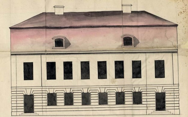 Bygglovsritning över fastigheten Blasieholmen 93, Jakob församling. Idag motsvaras platsen av fastigheten Blasieholmen 10. Huset var ett sockerbruk och låg på Blasieholmsgatan. Beställare var överste och baronen Fabian Löfven. Ritningen är en fasad-, plan- och nybyggnadsritning.